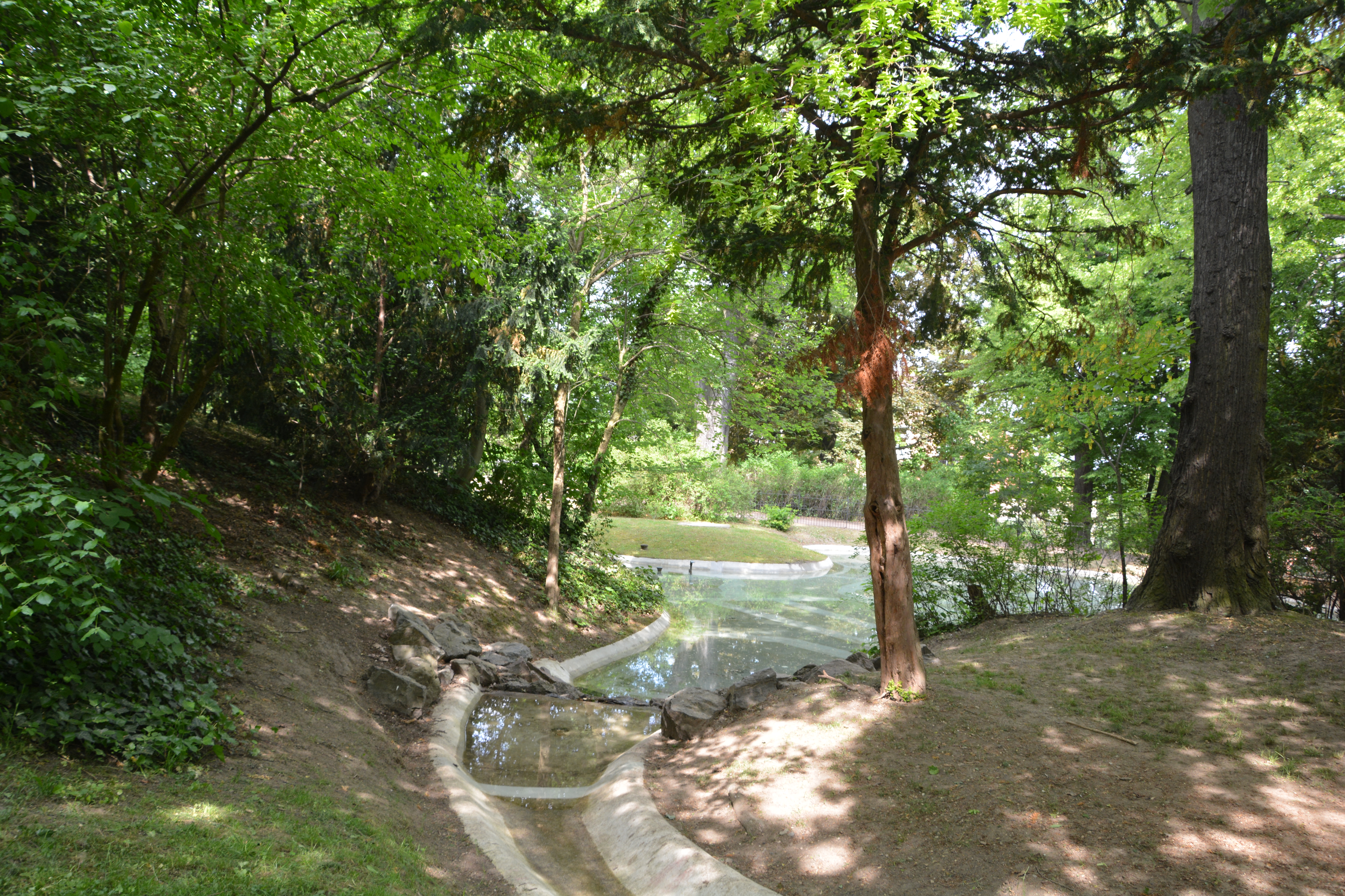 Der Fichtepark in Dresden-Plauen ist 1891 zunächst als „Westendpark“ eröffnet und erhielt fünf Jahre später den charakteristischen Bismarckturm.. Im Jahr 1903 kam eine großflächige Teichinstallation hinzu. Sie hat einen Wasserlauf, der im oberen Parkbereich einer Quelle entspringt und in den unten gelegenen Teich mündet. Anlässlich des 175. Geburtstages von Johann Gottlieb Fichte, einem bedeutenden deutschen Philosophen, wurde der Park 1937 in „Fichtepark“ umbenannt. 1954 erhielt der Bismarckturm den Namen „Fichteturm“. Bachlauf und Teich sind zuletzt 1992 saniert worden. Über die Jahre wurden Wasserrinne, Staustufen und Brunnenbecken marode. Die Wasserverluste waren so hoch, dass die Anlage 2013 trockengelegt werden musste. Am 15. Mai 2018 wurde die Teichanlage feierlich wieder in Betrieb genommen.